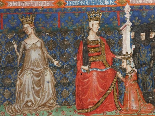 Karel I. z Anjou se synem a manželkou Beatrix